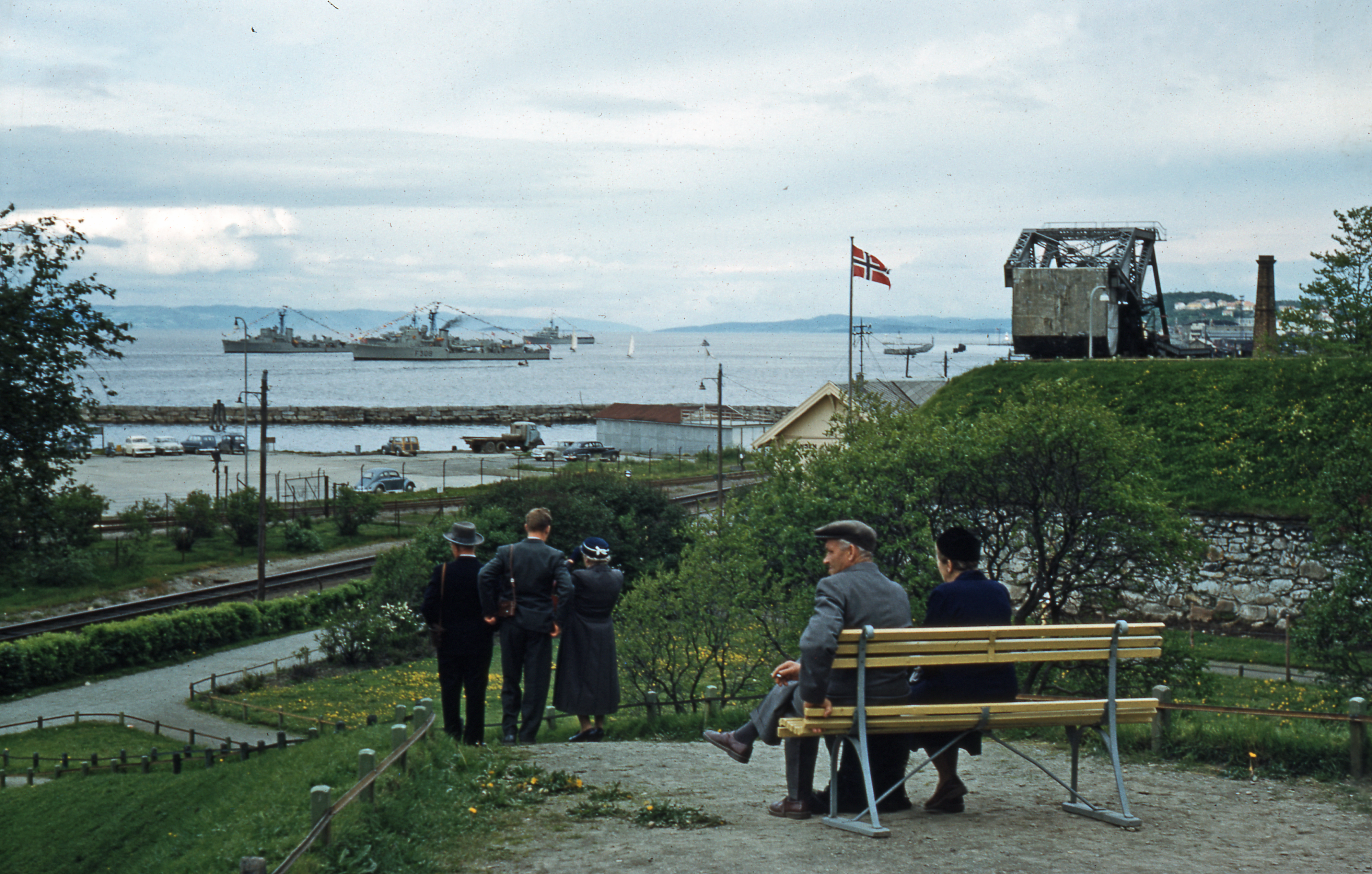 Format: Glasspositiv (Dias) Dato / Date: ca. 1958 Fotograf / Photographer: Ukjent Sted / Place: Trondheim Eier / Owner Institution: Trondheim byarkiv, The Municipal Archives of Trondheim Arkivreferanse / Archive reference: Tor.H43.B77.F18517 Merknad: Fra Byantikvarens lysbildesamling. Bildene er merket Trondheim 1954 - 1968, men de aller fleste synes å være fra omkring 1954 / 1955. Bildet er muligens tatt fra kong Olavs signingsferd til Trondheim i juli 1958.